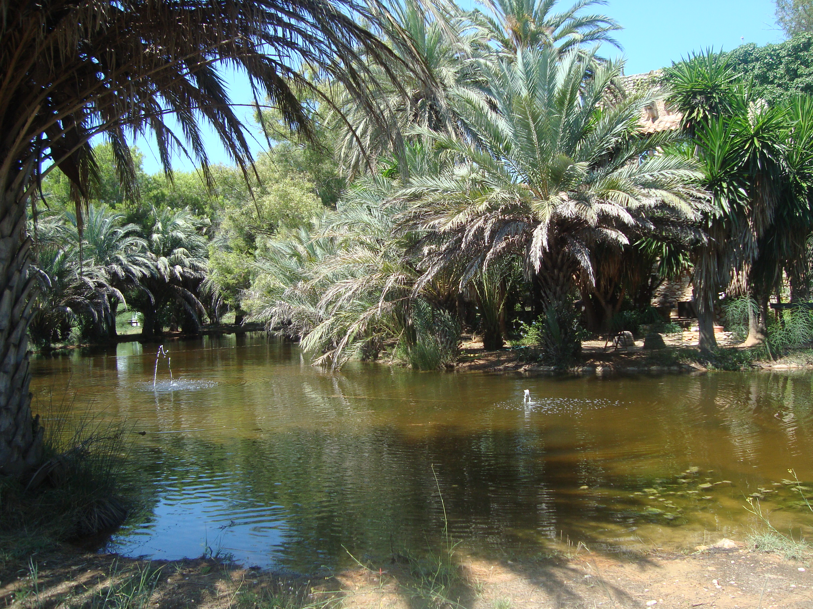 Jardines de la Torre de guaita de Capicorb